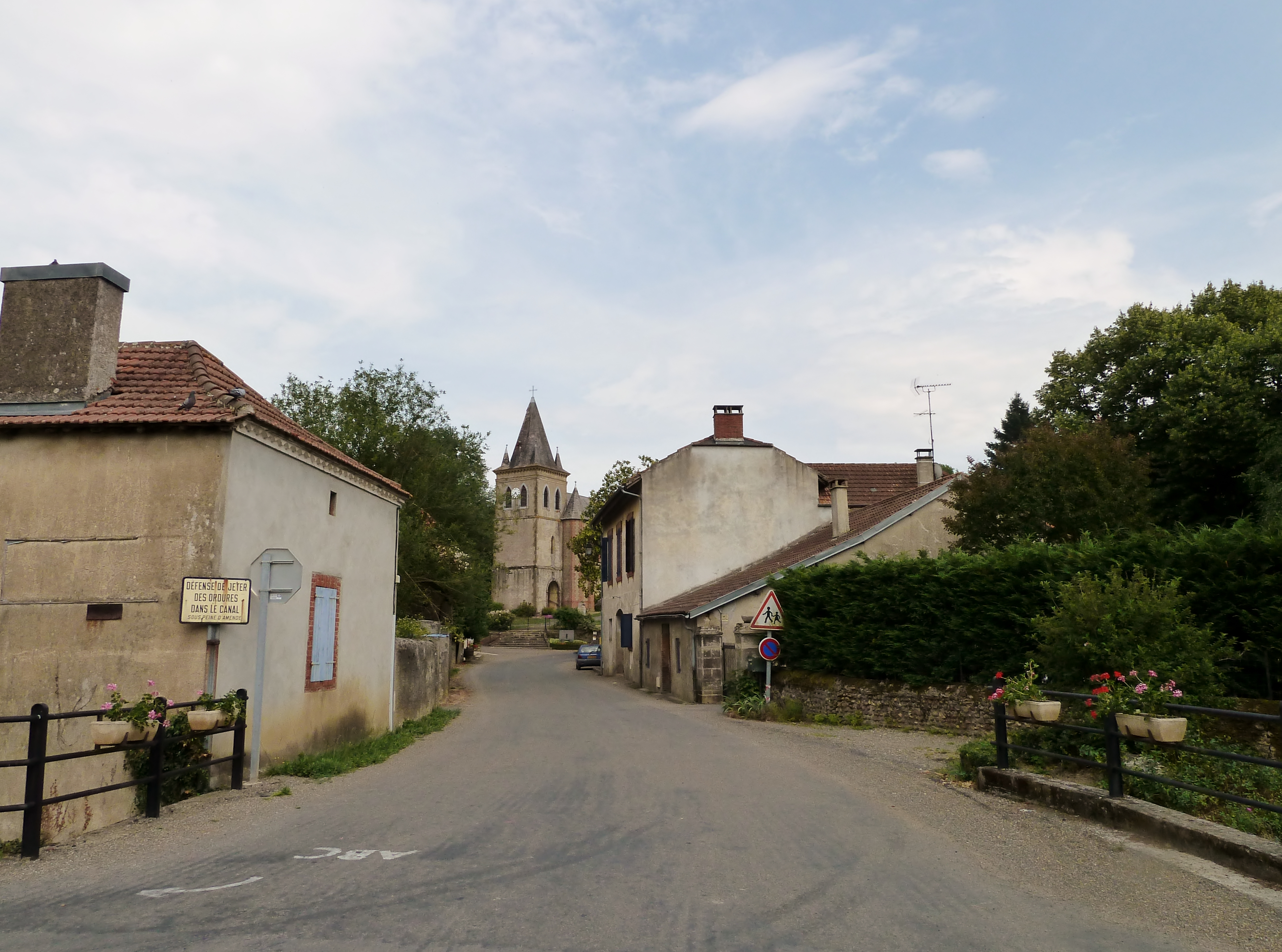 Sombrun